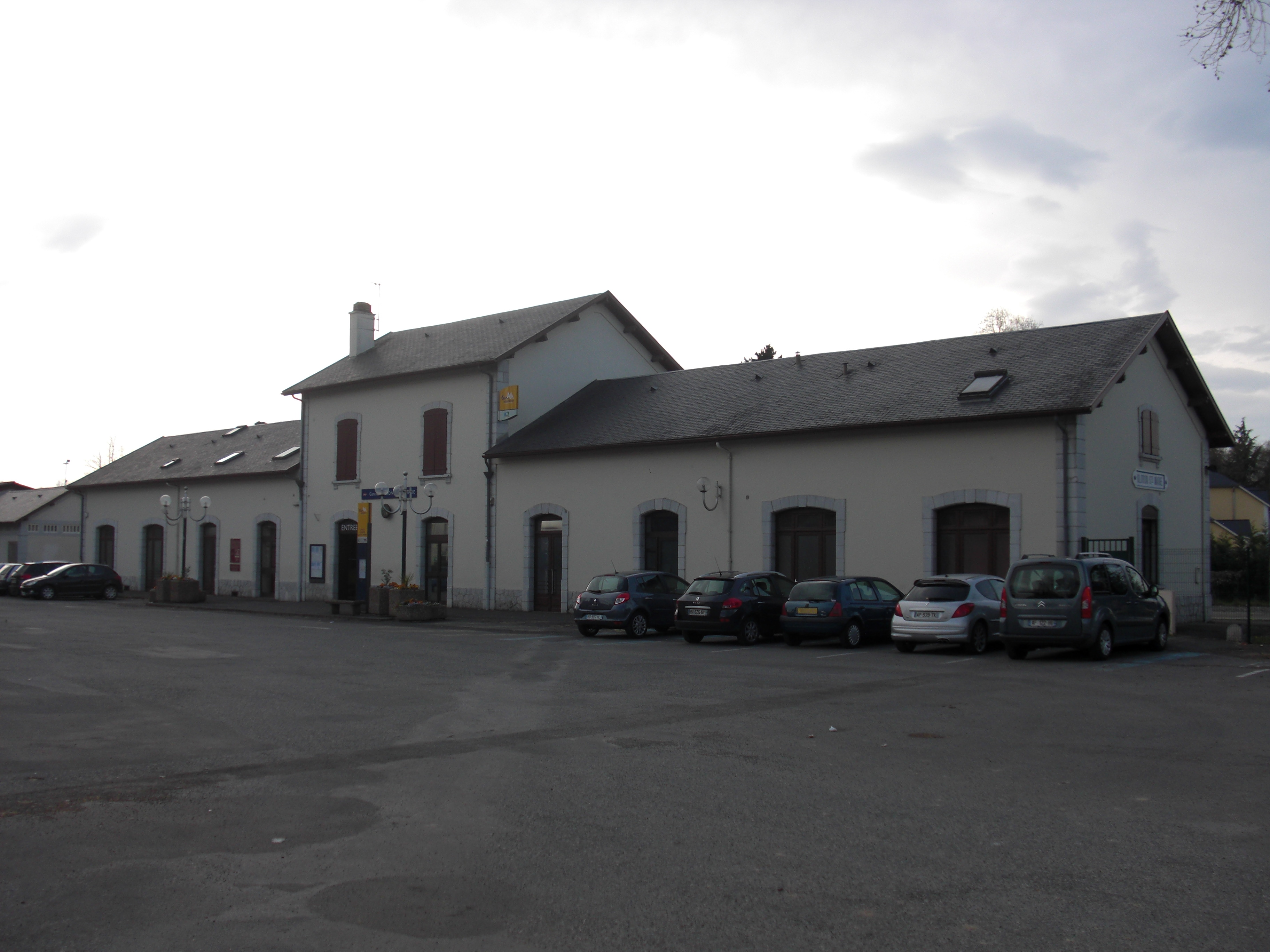 Oloron-Sainte-Marie (Pyrénées-Atlantiques, France) - La gare vue depuis le parking.